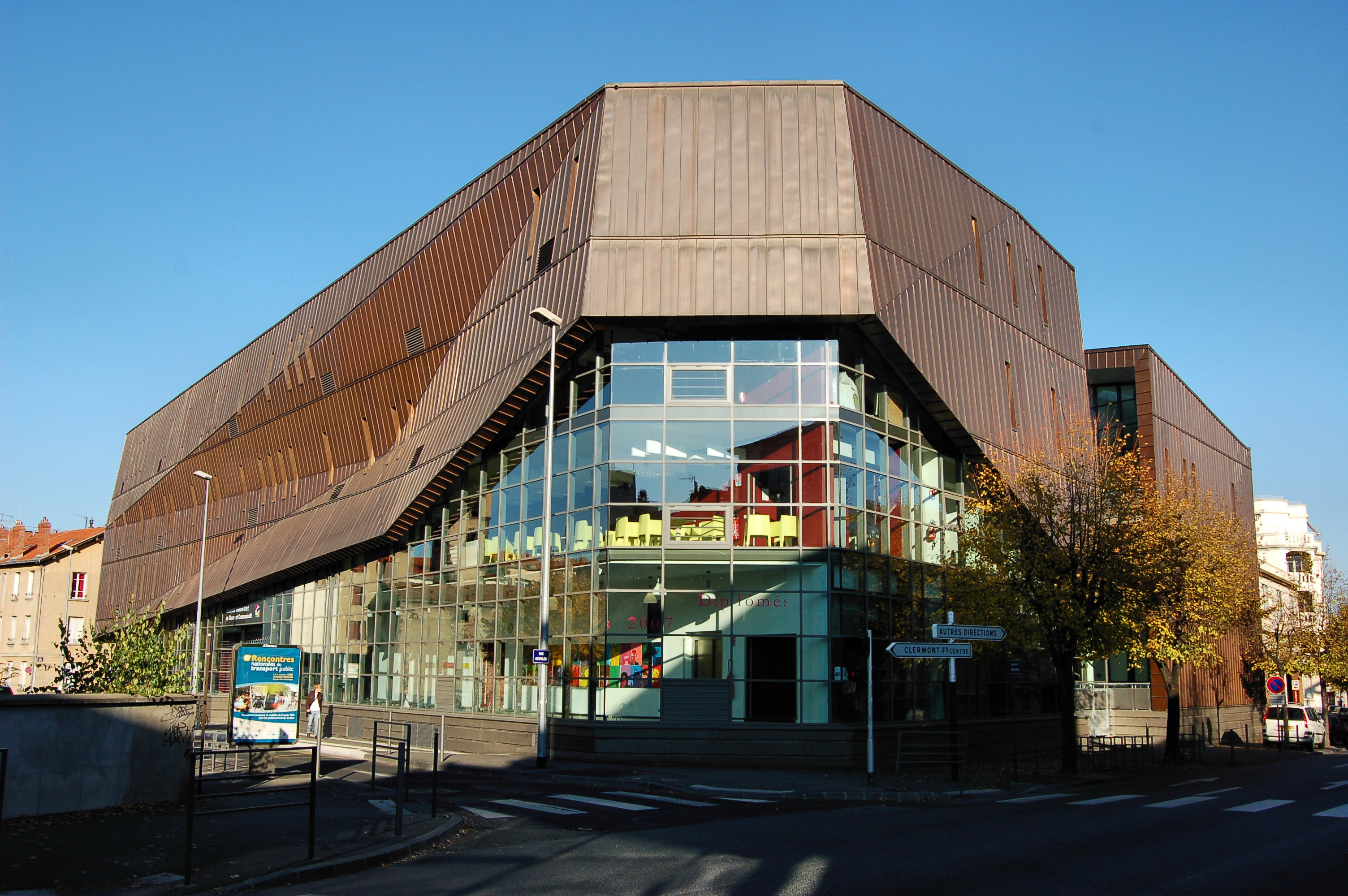 Ecole Supérieure d'Art de Clermont Communauté (Clermont-Ferrand, France)